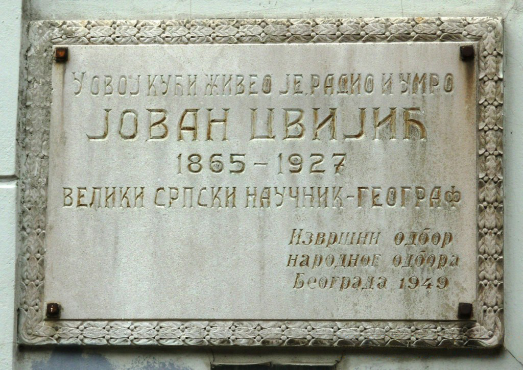 Tabla na zgradi u kojoj je živeo Jovan Cvijić. Beograd, Kopitareva gradina. Danas je (verovatno) muzej Jovana Cvijića. Slikao Goldfinger